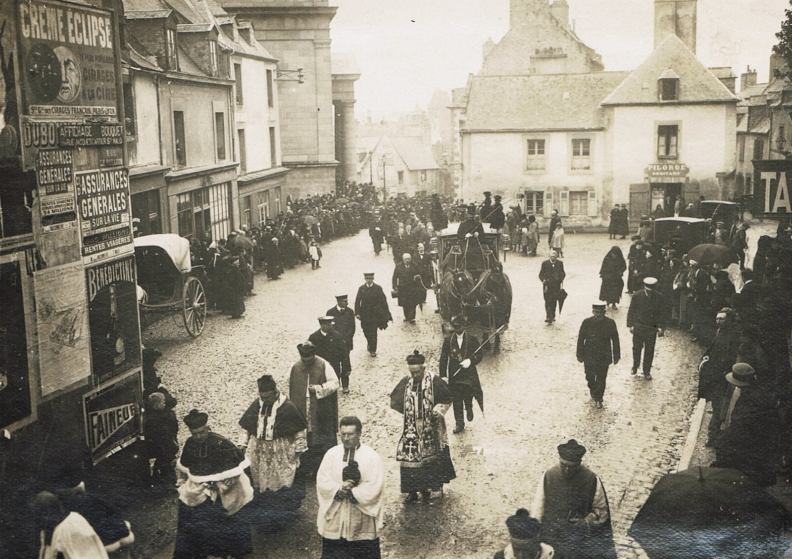 Les funérailles de l'académicien Louis Duchesne le 2 mai 1922, à Saint-Servan-sur-Mer (aujourd'hui Saint-Malo, France). Le cortège remonte depuis l'église Sainte-Croix.